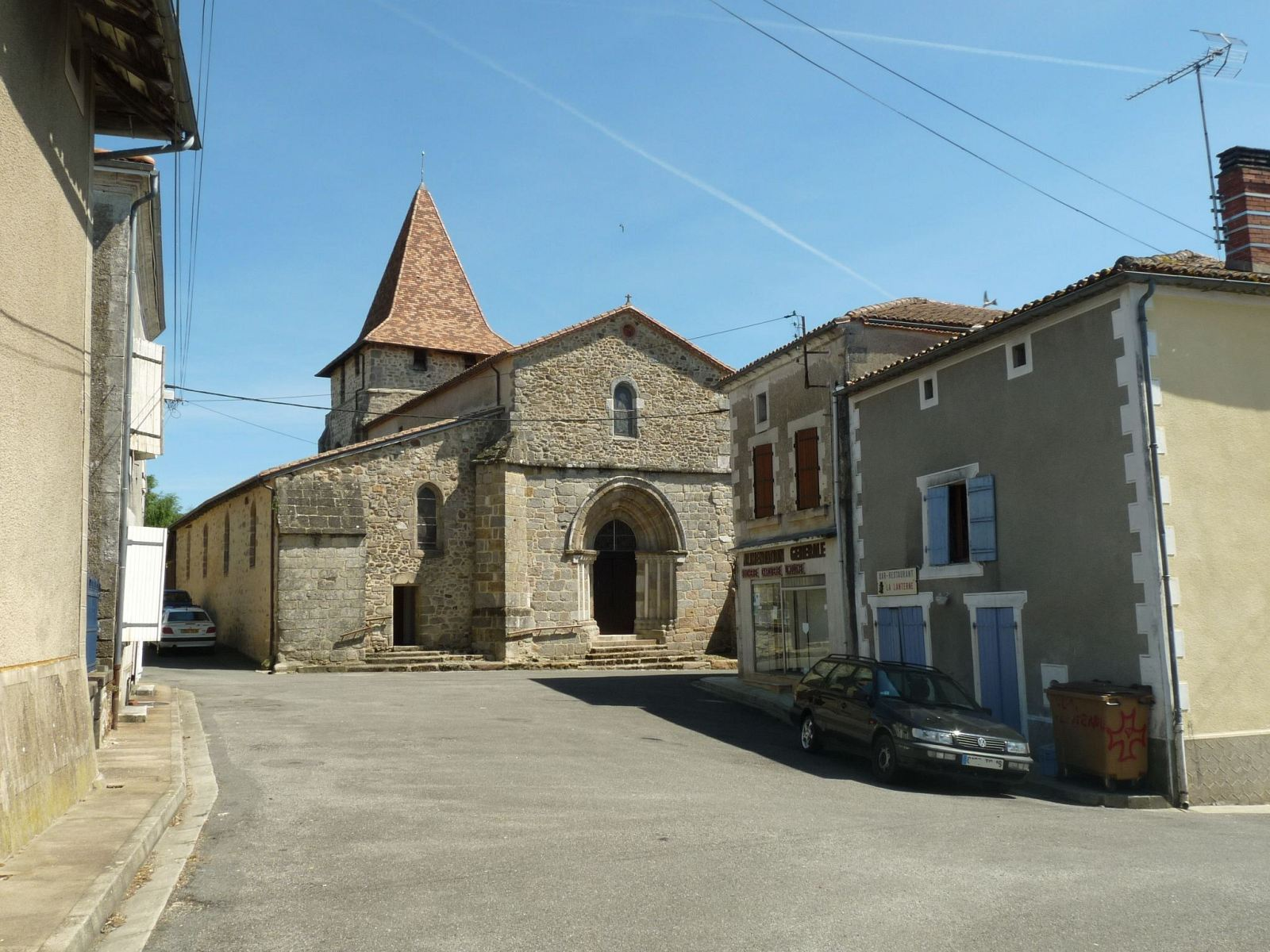 place de l'église de Roussines, Charente, France